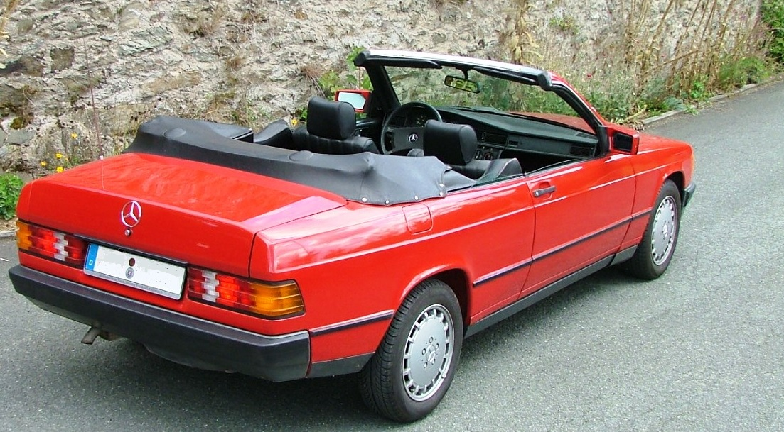 AKH 201C in Signalrot